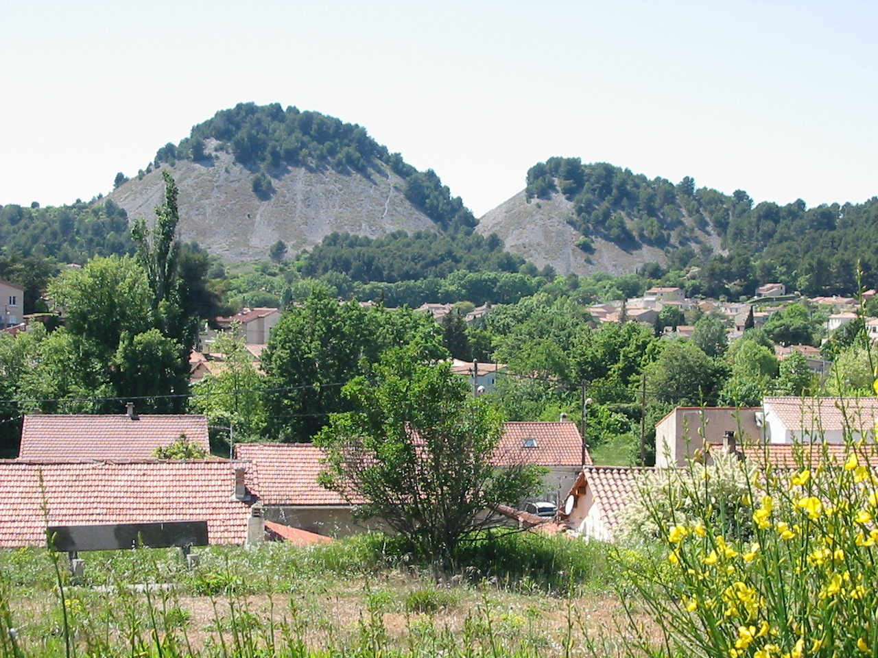 Les deux terrils et le hameau de Biver à Gardanne